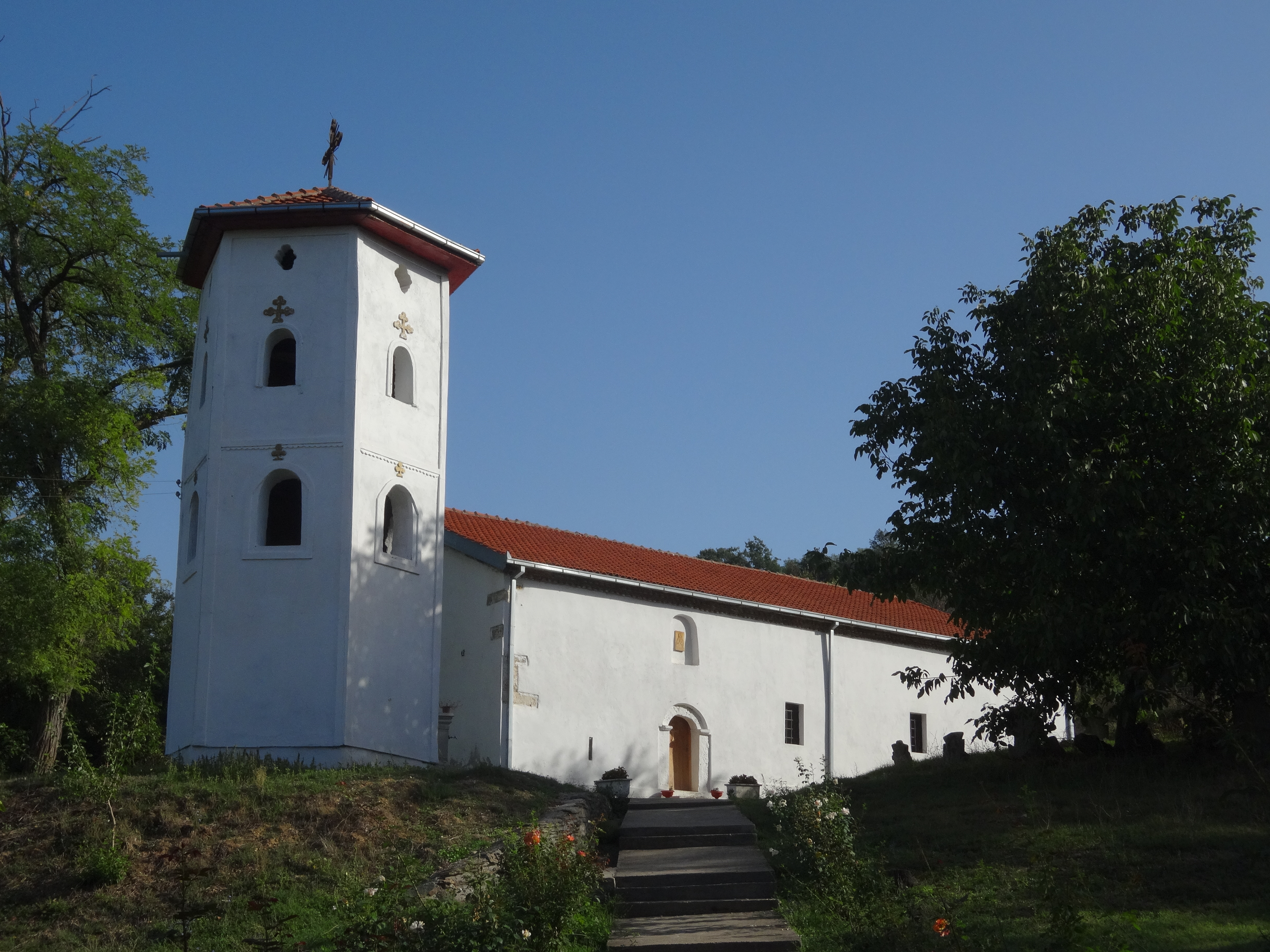 Rudare, Leskovac